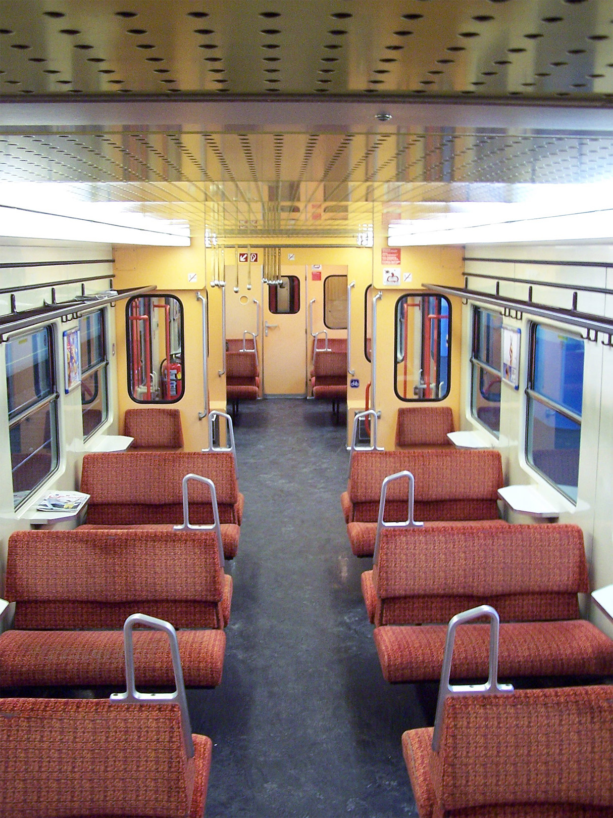 Innenansicht des 7020 115